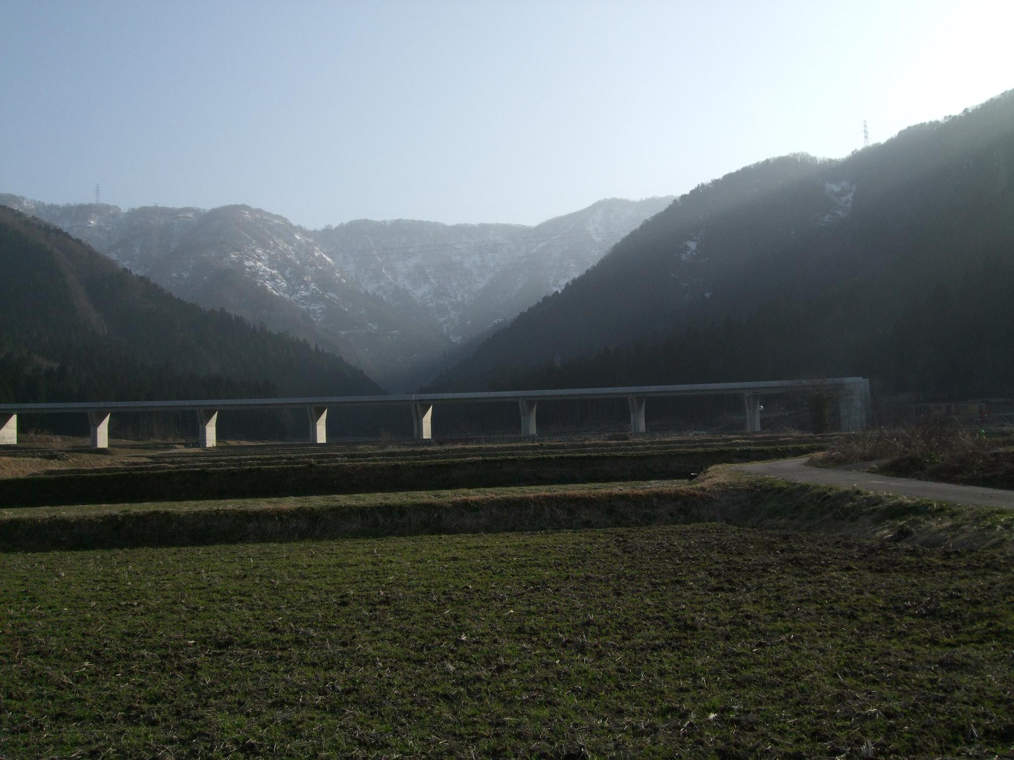 中部縦貫自動車道（永平寺大野道路）永平寺町栗住波 栗住波高架橋 2008.3.17 投稿者が撮影